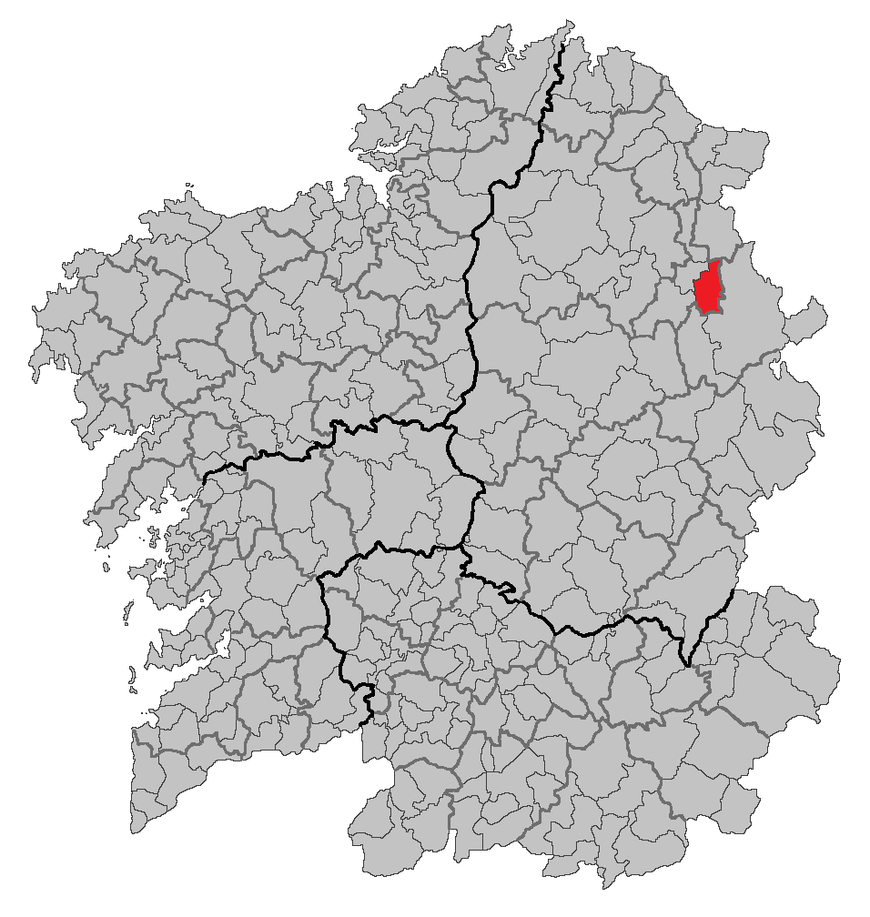 Mapa coa localización do concello de Ribeira de Piquín.